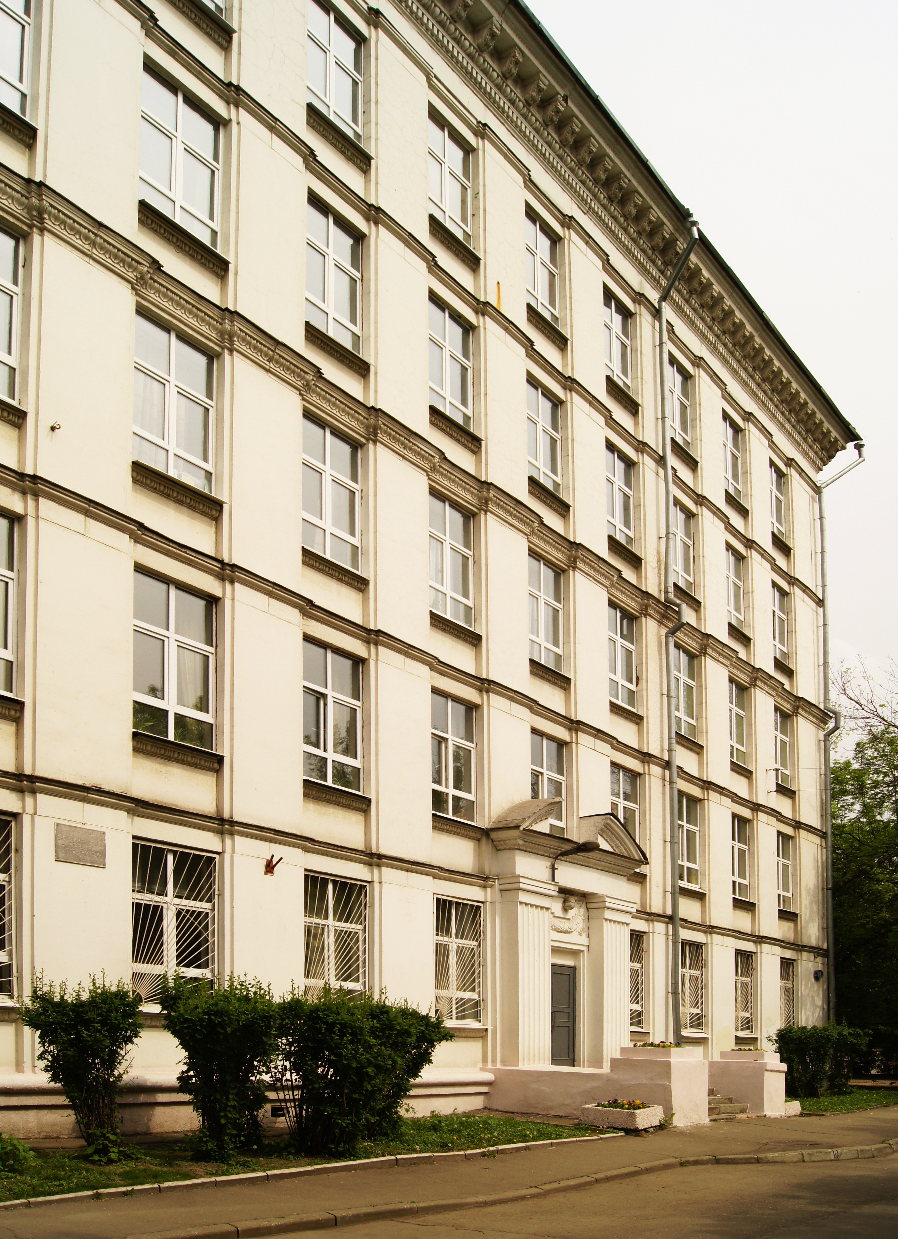 Povarskaya Street Moscow 14